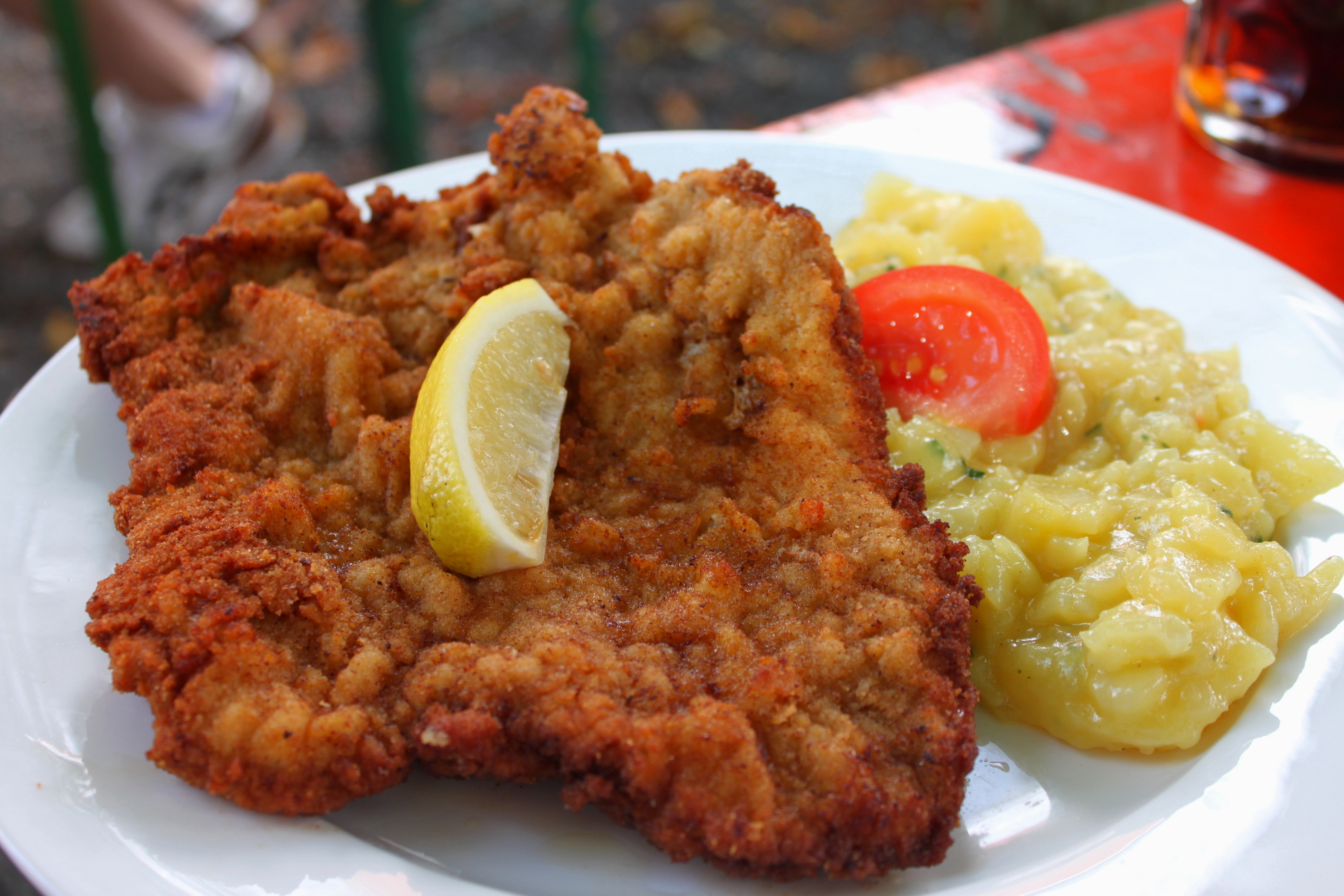 Der Gasthof der Brauerei Krug in Breitenlesau ist ein Ausflugsziel für Gäste aus einem weiten Umkreis. Die Spezialität ist Schnitzel mit Kartoffelsalat